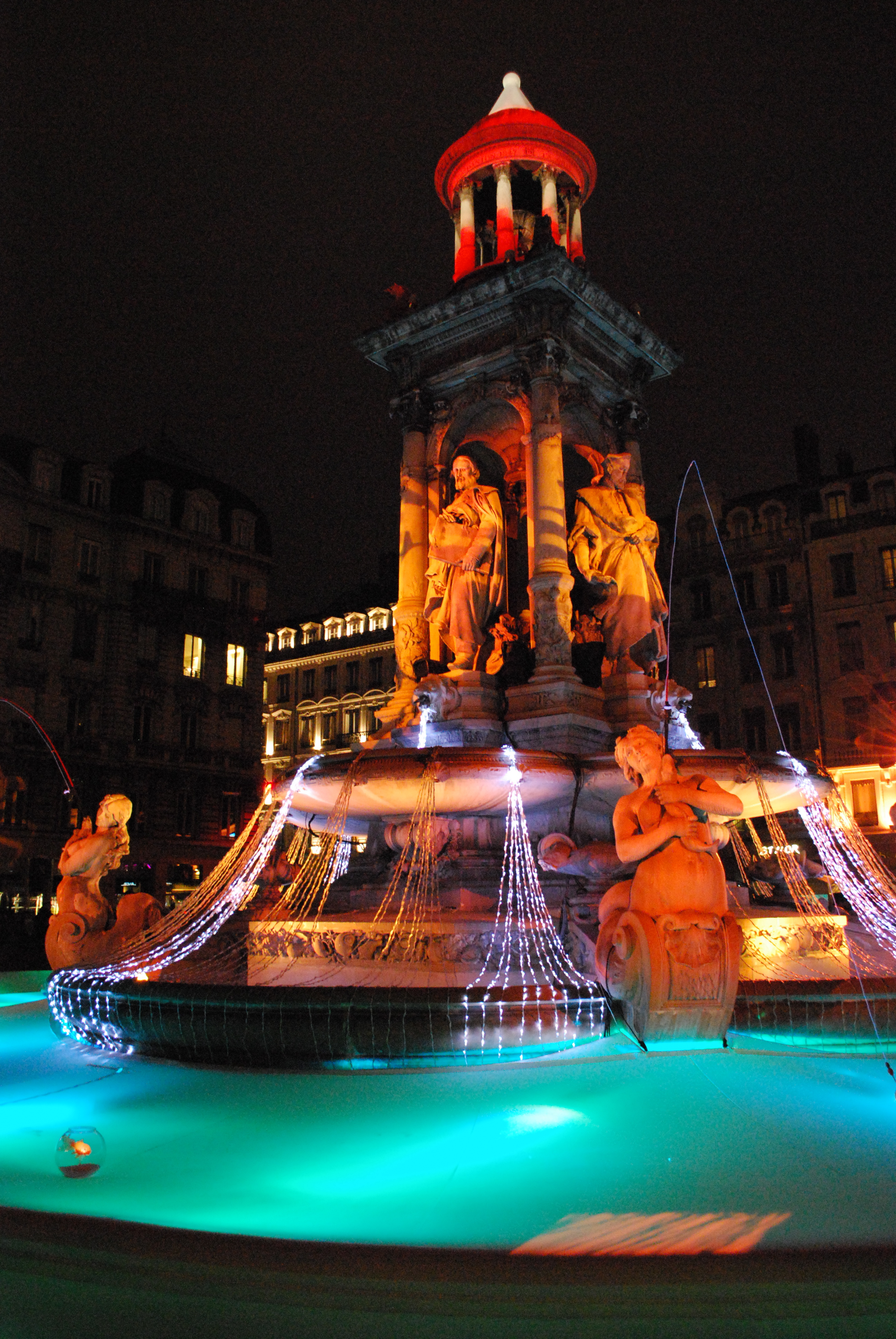 Durant les illuminations du 8 Décembre, année 2010 - spectacle dit de "La Source de la Lumière"